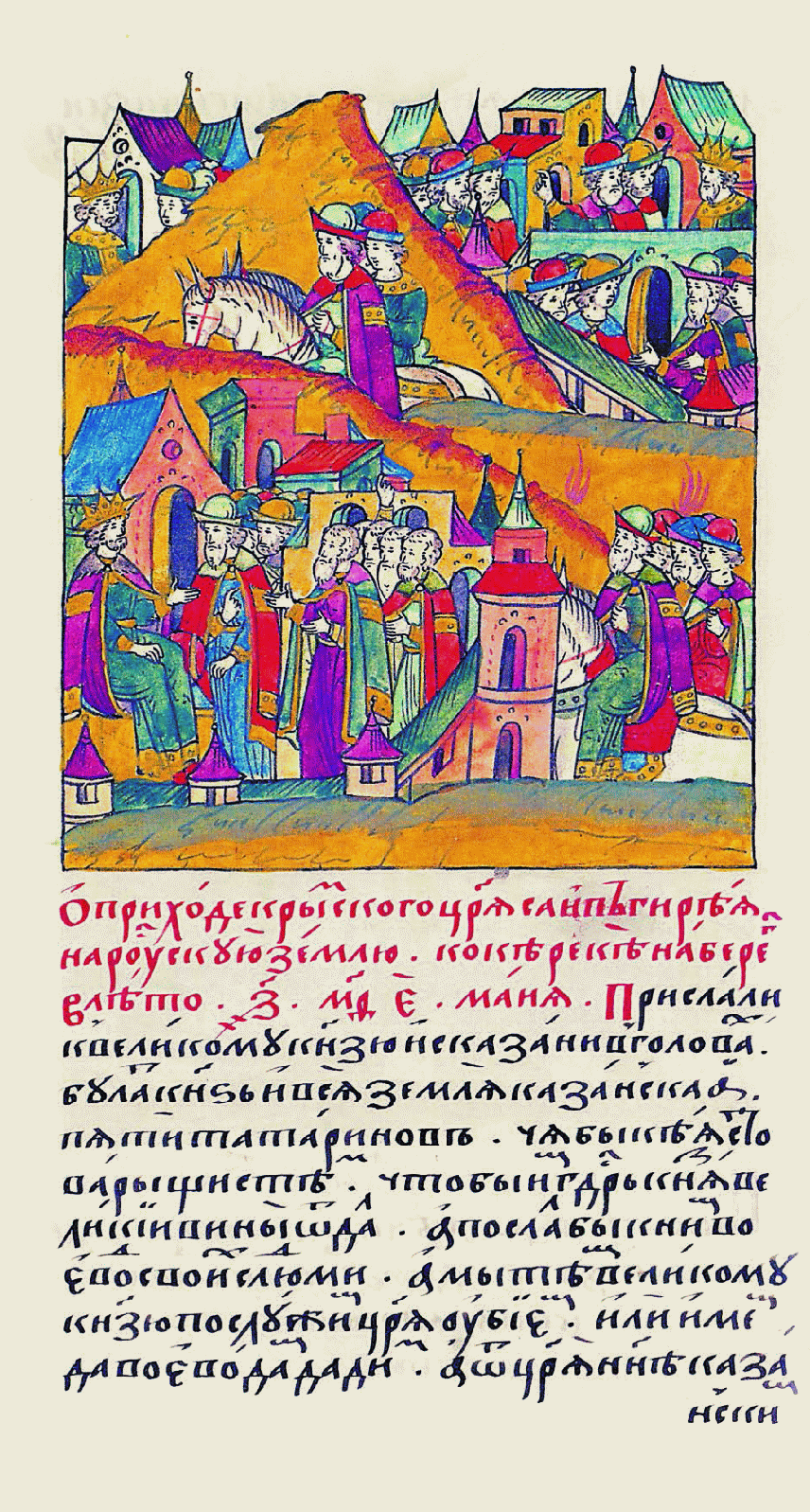 Миниатюра Лицевого летописного свода XVI в.: "О приходе Крымско- го царя Саип-Гирея на Рускую землю к Оке реке на берег. В 7049 году в мае при- слали к великому кня- зю из Казани, в голо- вах Булат-князь и вся земля Казанская, пять татар, Чабыкея с това- рищами, с тем, чтобы им государь князь великий вину простил, а послал бы к ним во- евод своих с людьми: «А мы тем великому князю послужим: царя убьем или захватим, да воеводам дадим; а от царя ныне казан- ским».